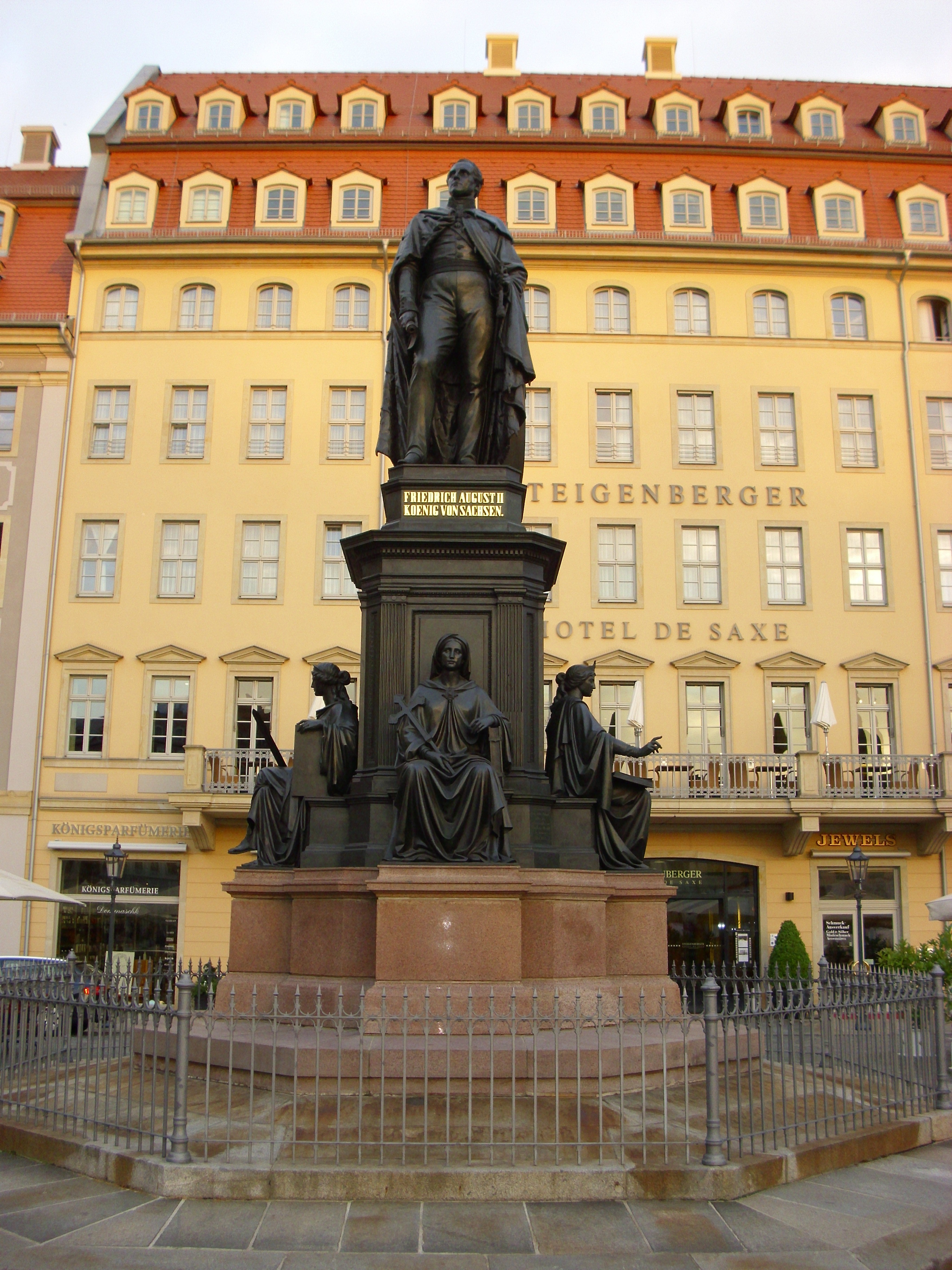 Das Standbild von Friedrich August II. (Sachsen) auf dem Dresdener Neumarkt